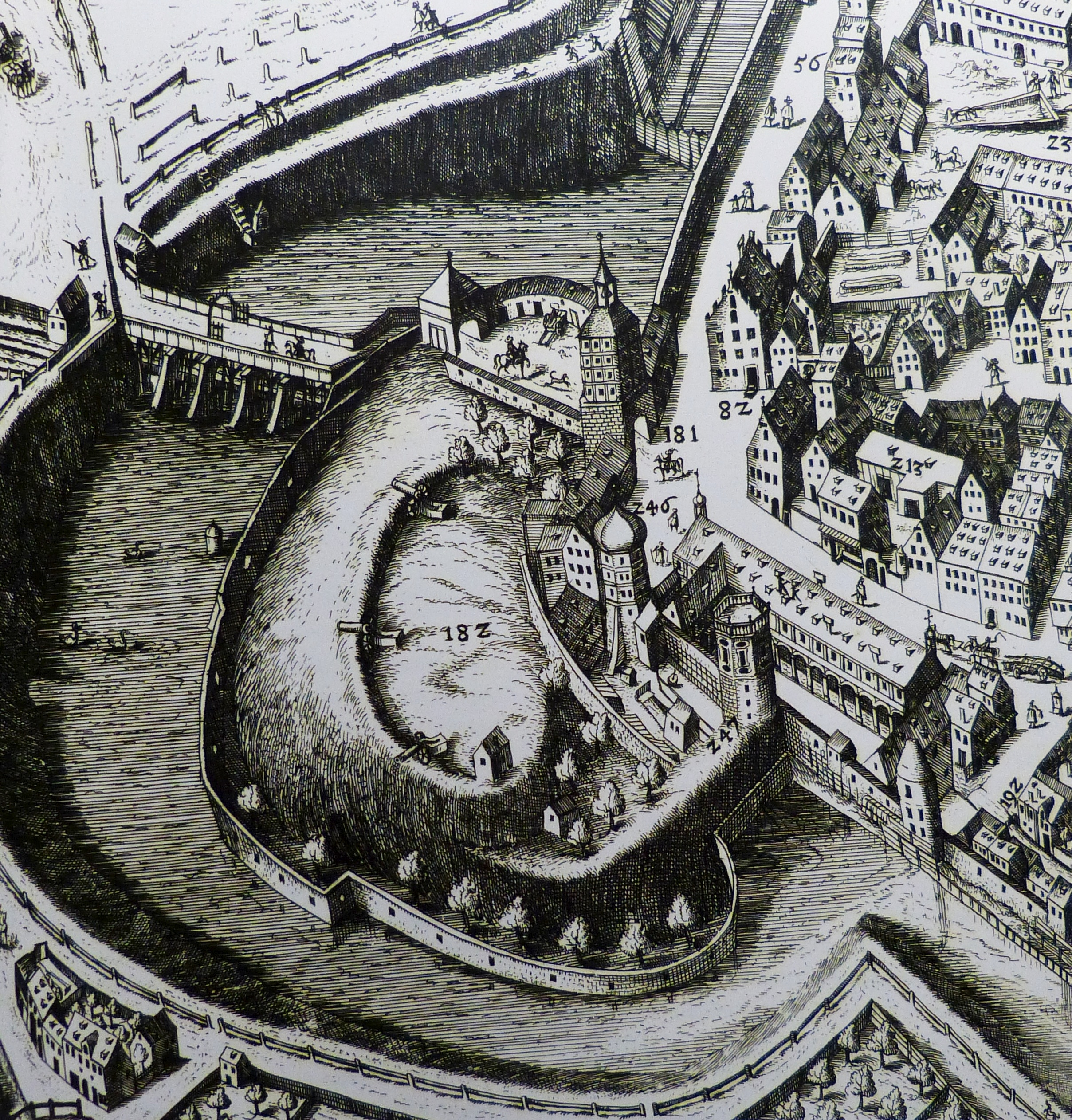 Ausschnitt aus dem Kilianplan von Augsburg, 1626 in acht Teilen in Kupfer gestochen von Wolfgang Kilian auf Basis der Vermessungen von Christoph Schissler (Stand ca. 1600). Der Ausschnitt zeigt den Bereich der Stadtbefestigung um den Roten-Torwall, mit dem breiten wassergefüllten Stadtgraben, der Aquädukt-Brücke zum Roten Tor, dem Wasserwerk am Roten Tor mit dem Großen und Kleinen Wasserturm und dem Kastenturm. Der Große Kastenturm hatte damals noch ein Satteldach, der Kleine Wasserturm eine Zwiebelhaube. Das Heilig-Geist-Spital von Elias Holl ist in diesem Plan bereits eingezeichnet, obwohl es zu dem Zeitpunkt erst in Planung bzw. noch im Bau war.